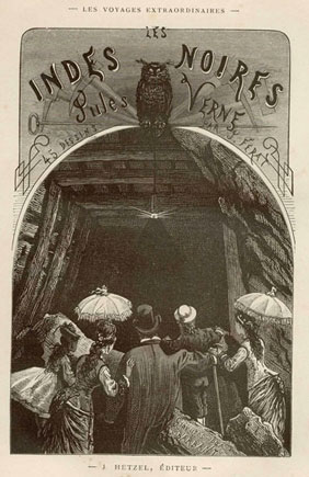 Původní ilustrace Julese Férata k románu J. Verna